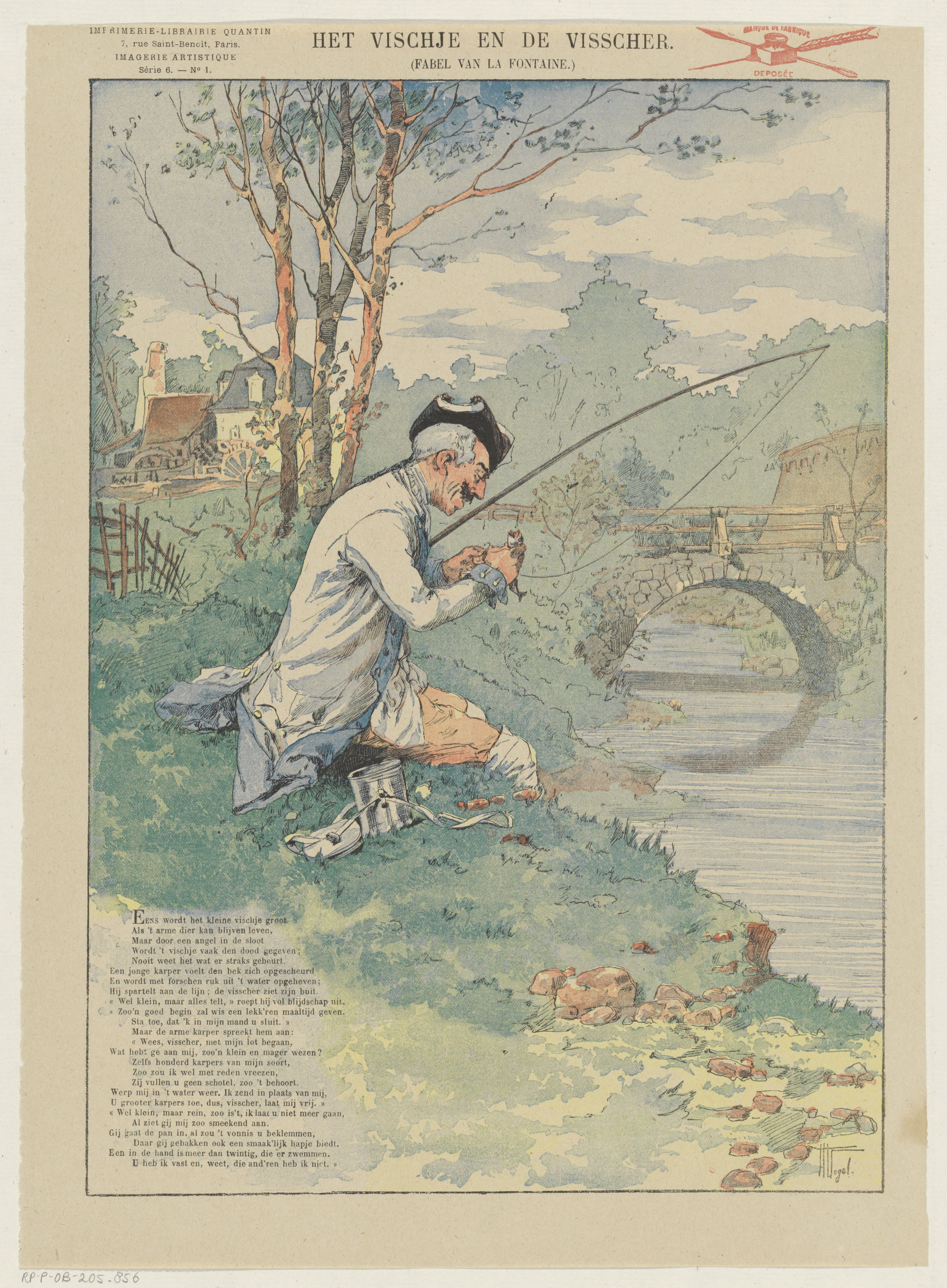 IdentificatieTitel(s): Het vischje en de visscher (titel op object)Fabel van La Fontaine (serietitel op object)Imagerie Artistique / Série 6 (serietitel op object)Objecttype: prent volksprent Serienummer: 1/20Objectnummer: RP-P-OB-205.856Opschriften / Merken: verzamelaarsmerk, verso, gestempeld: Lugt 2760octrooivermelding, recto rechtsboven, gestempeld: ‘marque de fabrique / deposée’, rode stempel met inktpot, pen en schrijfveerOmschrijving: Blad met een grote voorstelling uit de fabel van Jean de La Fontaine, van de visser en het visje. Linksonder een vers. Genummerd linksboven: Série 6. - No. 1.VervaardigingVervaardiger: ontwerper: Hermann Vogel (vermeld op object)prentmaker: anoniemuitgever: Albert Quantin (vermeld op object)Plaats vervaardiging: ParijsDatering: 1876 - 1890 en/of 1888Fysieke kenmerken: kleurenlithografie en tekst in boekdrukMateriaal: papier Techniek: kleurenlithografie (procedé) / boekdrukAfmetingen: blad: h 366 mm × b 268 mmOnderwerpWat: fabelsfishermanVerwerving en rechtenCredit line: Schenking van de heer F.G. Waller, AmsterdamVerwerving: schenking 1923Copyright: Publiek domein